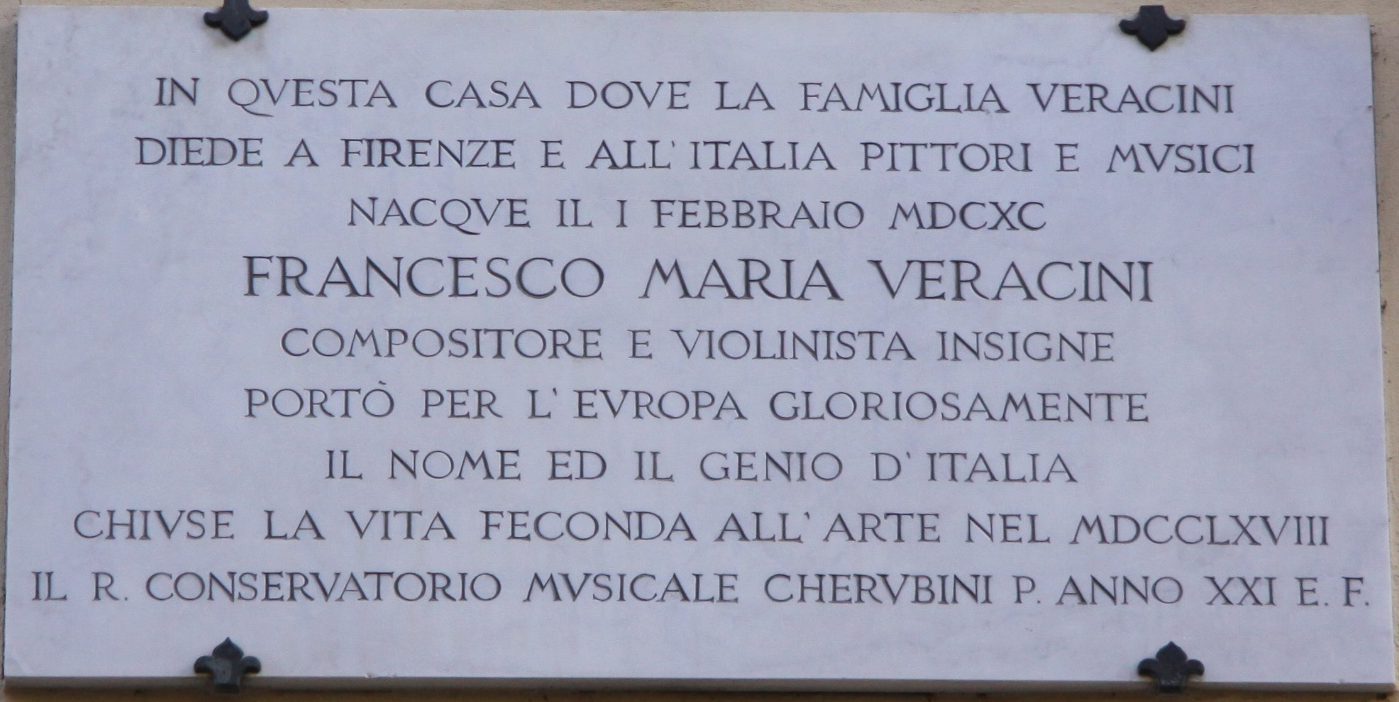 In questa casa dove la famiglia Veracini diede a Firenze e all'Italia pittori e musici nacque il 1 Febbraio 1690 Francesco Maria Veracini compositore e violinista insigne portò per l'europa gloriosamente il nome e il genio d'italia. Chiuse la vita feconda all'arte nel 1768. Il regio conservatorio musicale Cherubini pose anno 21 Era Fascista (1943).